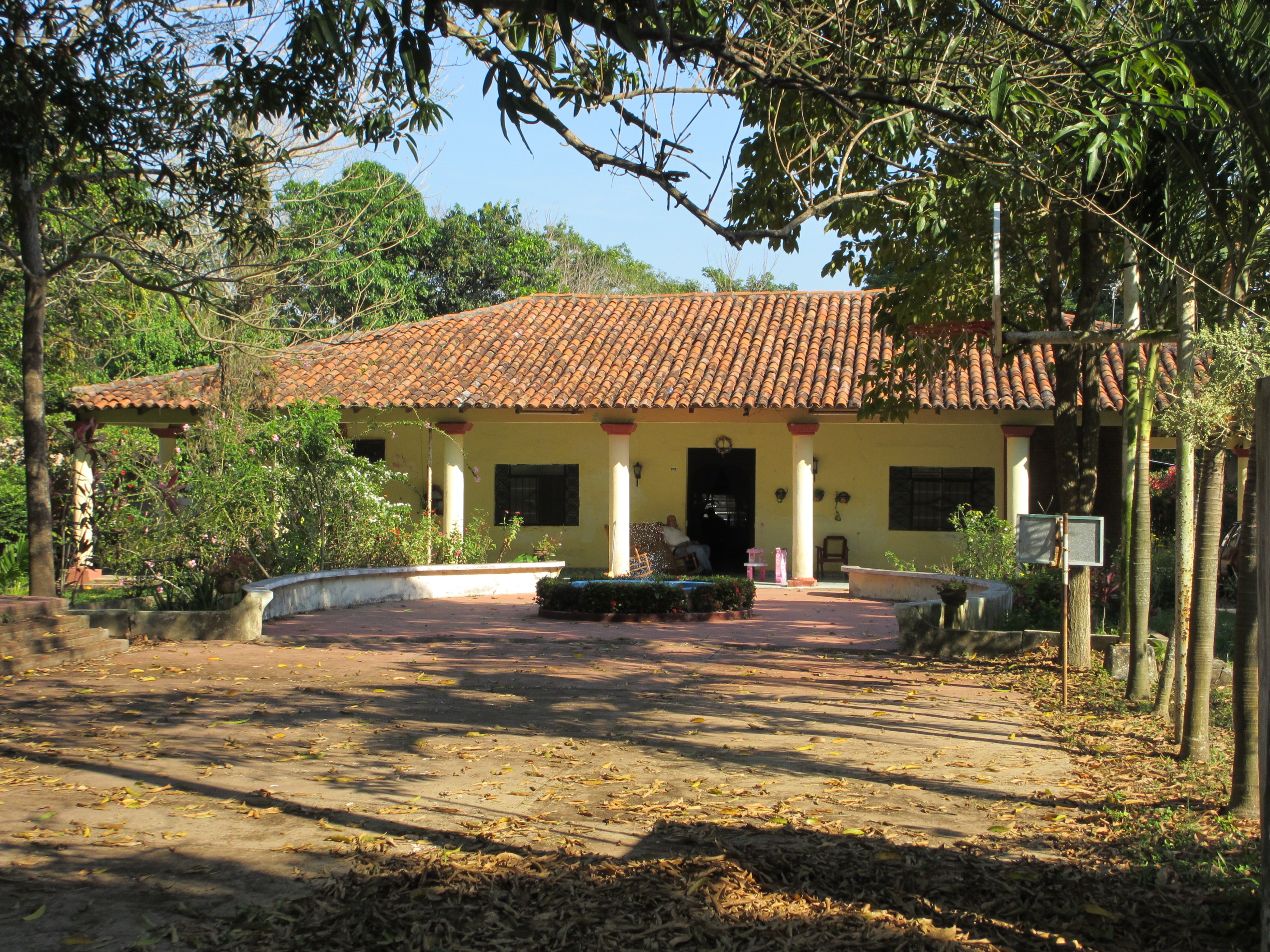 Casco de la Finca Cholula. Comalcalco. Tabasco. México